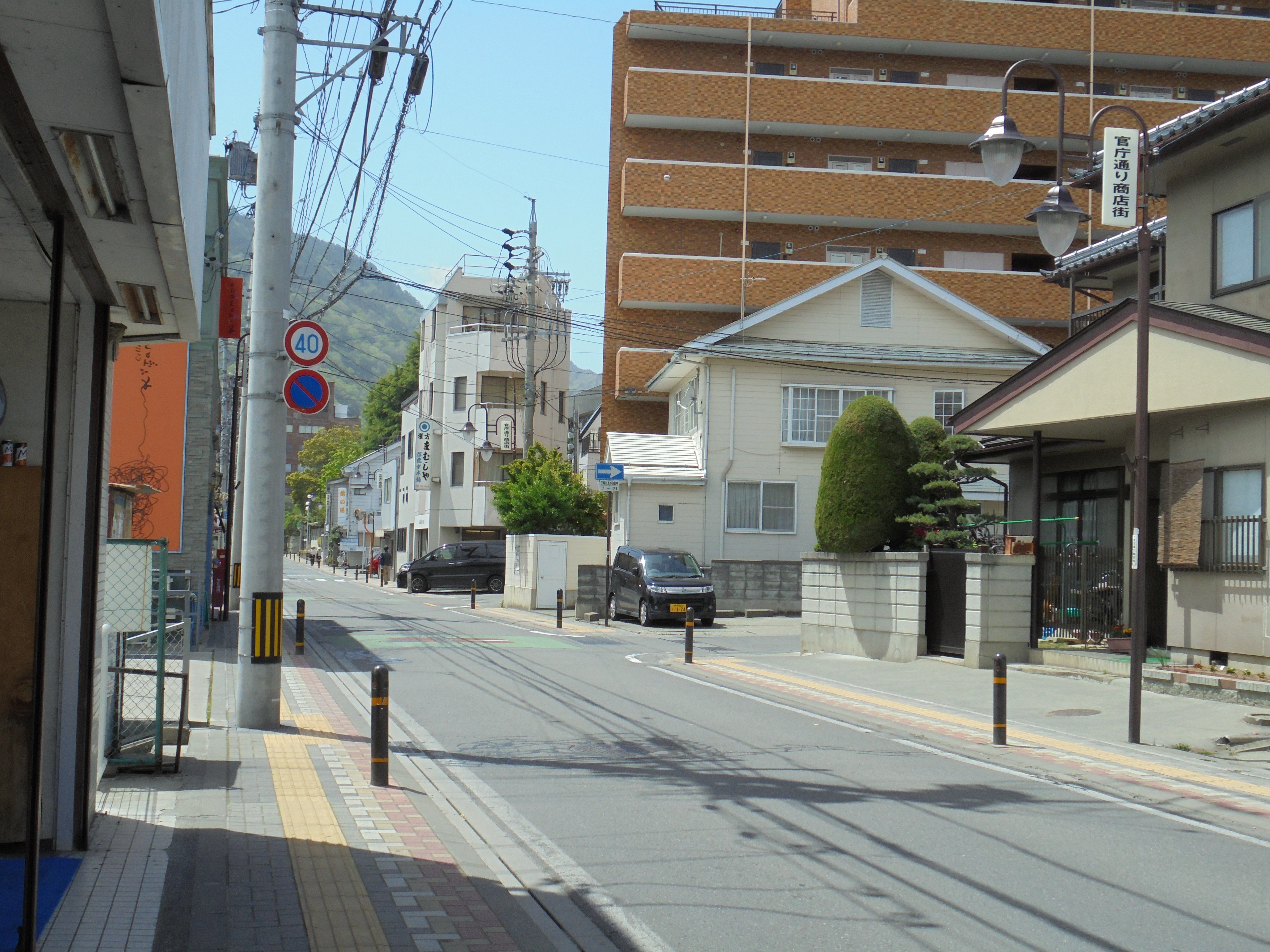 官庁通り（長野県長野市諏訪町）